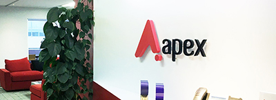 エイペックス株式会社の受付